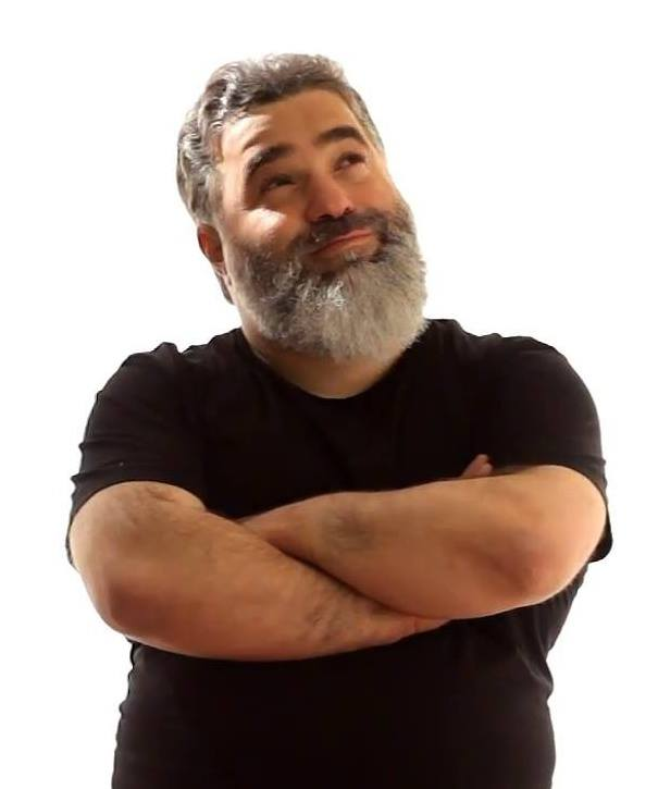 זבולון מושיאשווילי